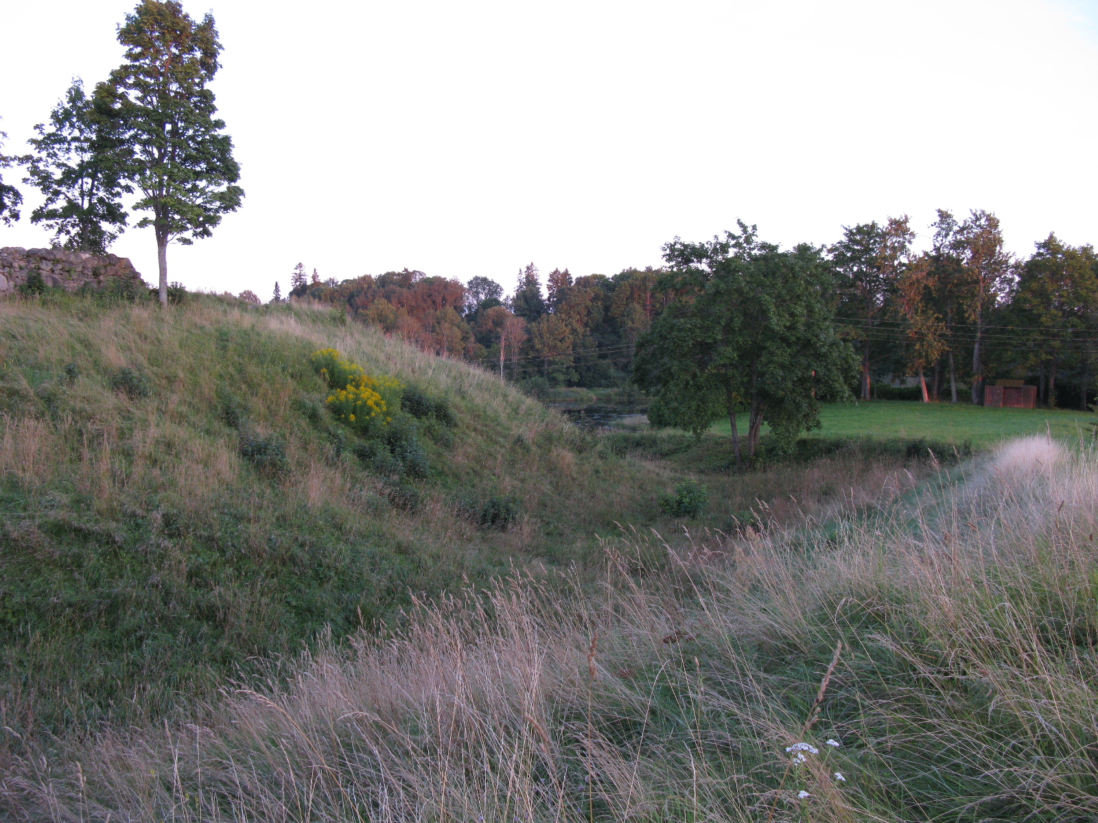 Läänepoolne vallikraav jõe suunas.